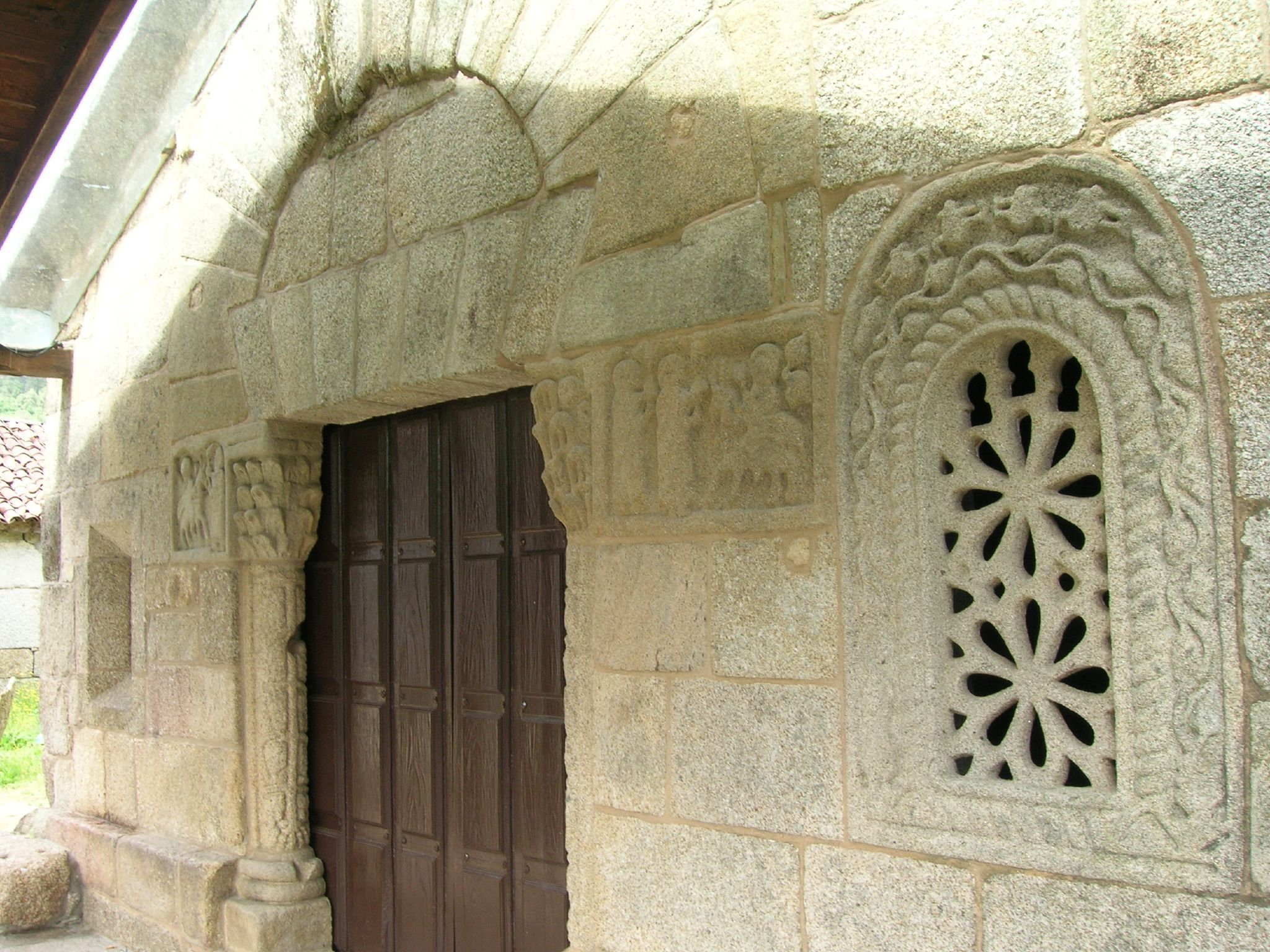 Fachada da Capela de San Xés de Francelos